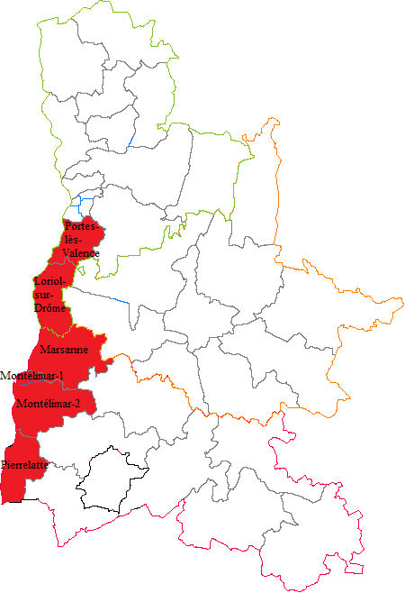 Deuxième circonscription législative du département de la Drôme